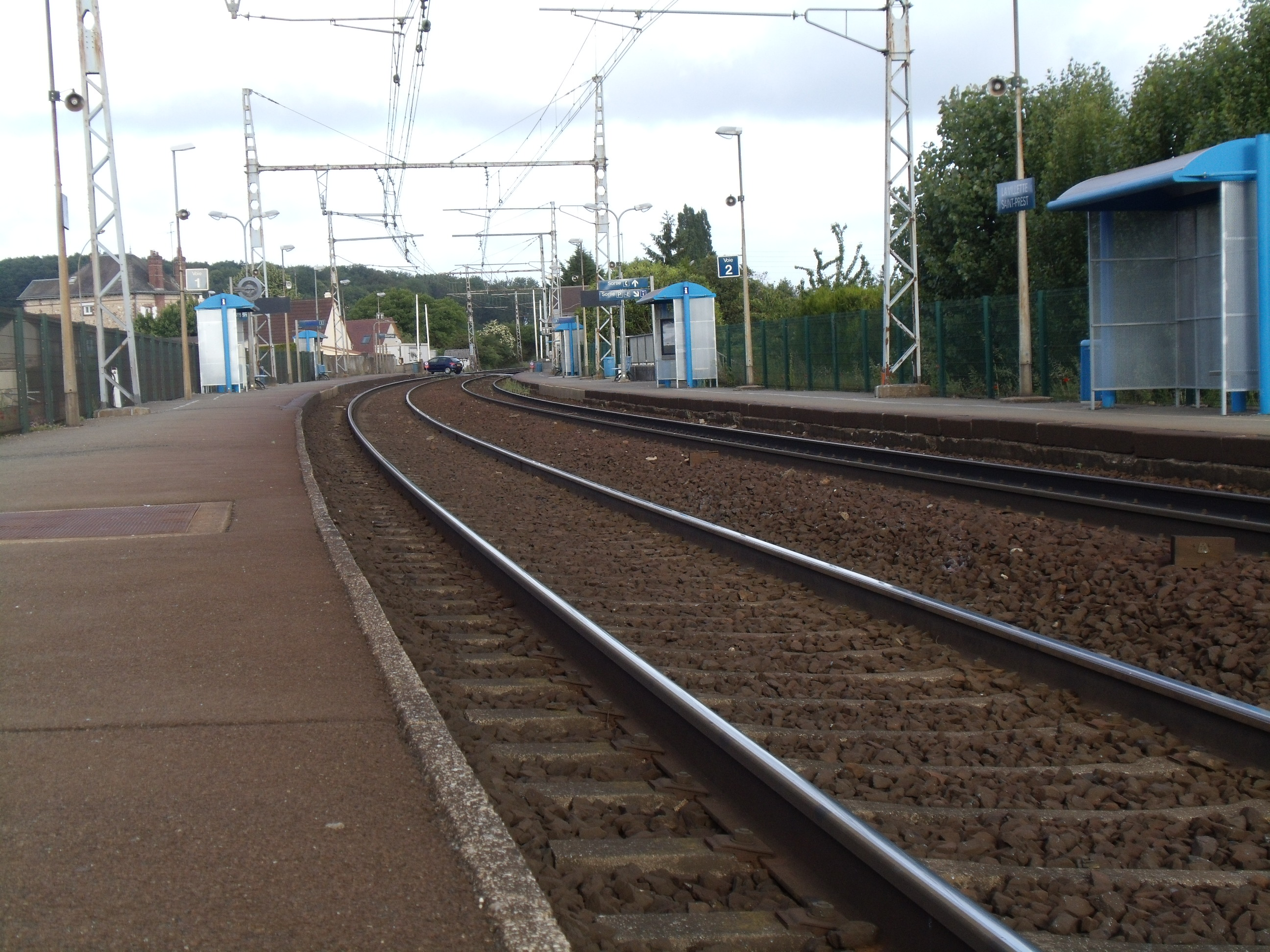 Vue des quais de la gare en direction de Chartres; Le passage à niveau est au fond